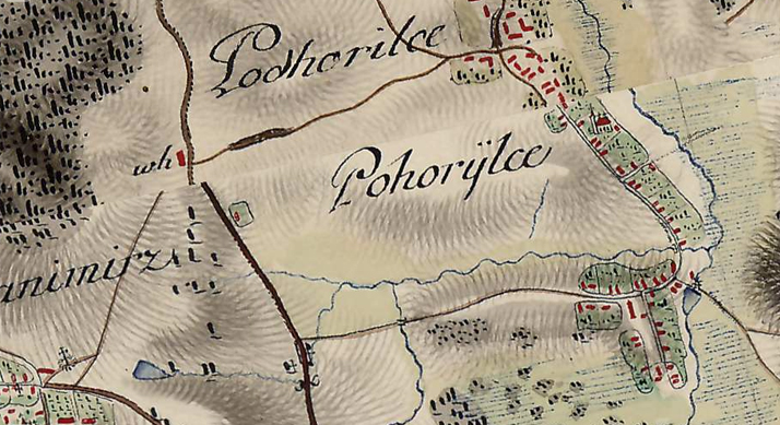 Карта села 1783 року